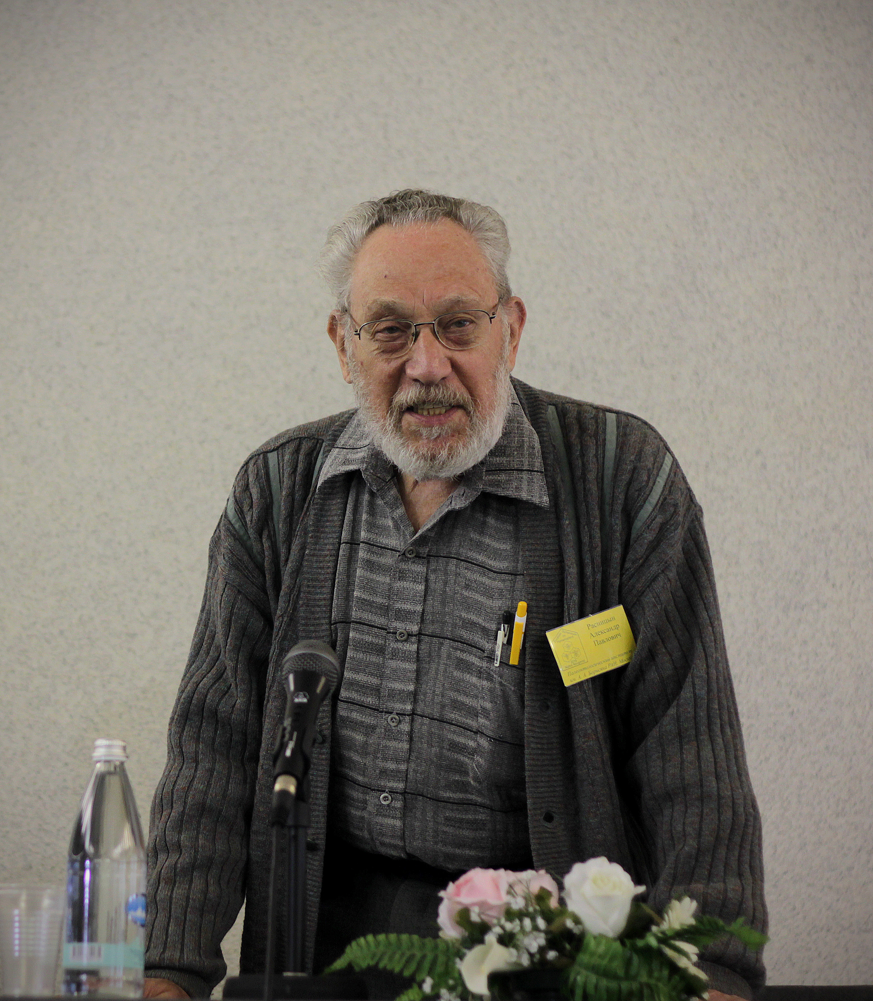 Расницын А.П. на Евроазиатском Симпозиуме по перепончатокрылым насекомым (III Симпозиум стран СНГ), прошедший в Нижнем Новгороде на базе Нижегородского государственного университета им. Н.И. Лобачевского